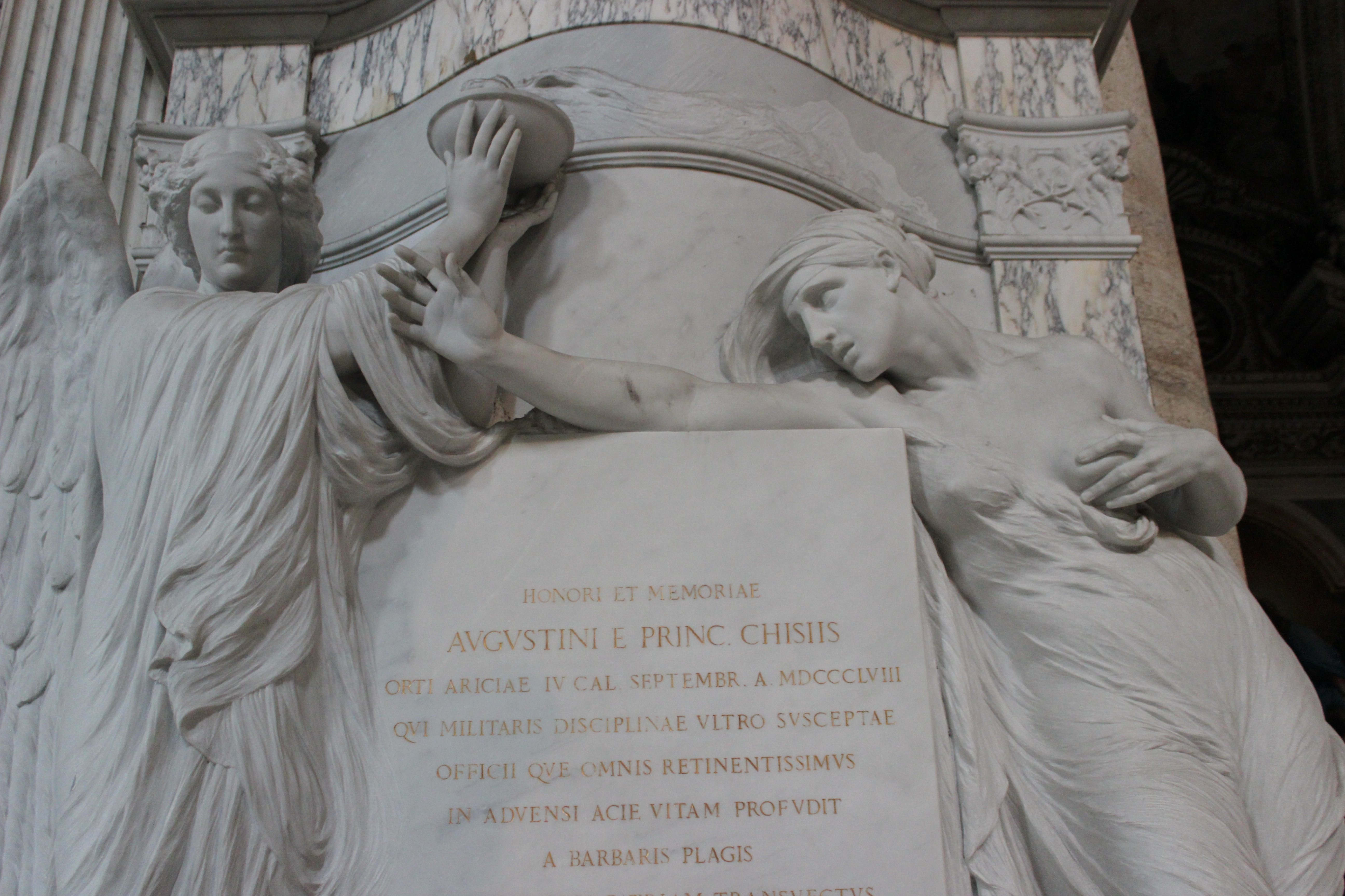 Roma. Santa Maria del Popolo. Memoria funeraria de Agostino Chigi. Adolfo Apolloni.